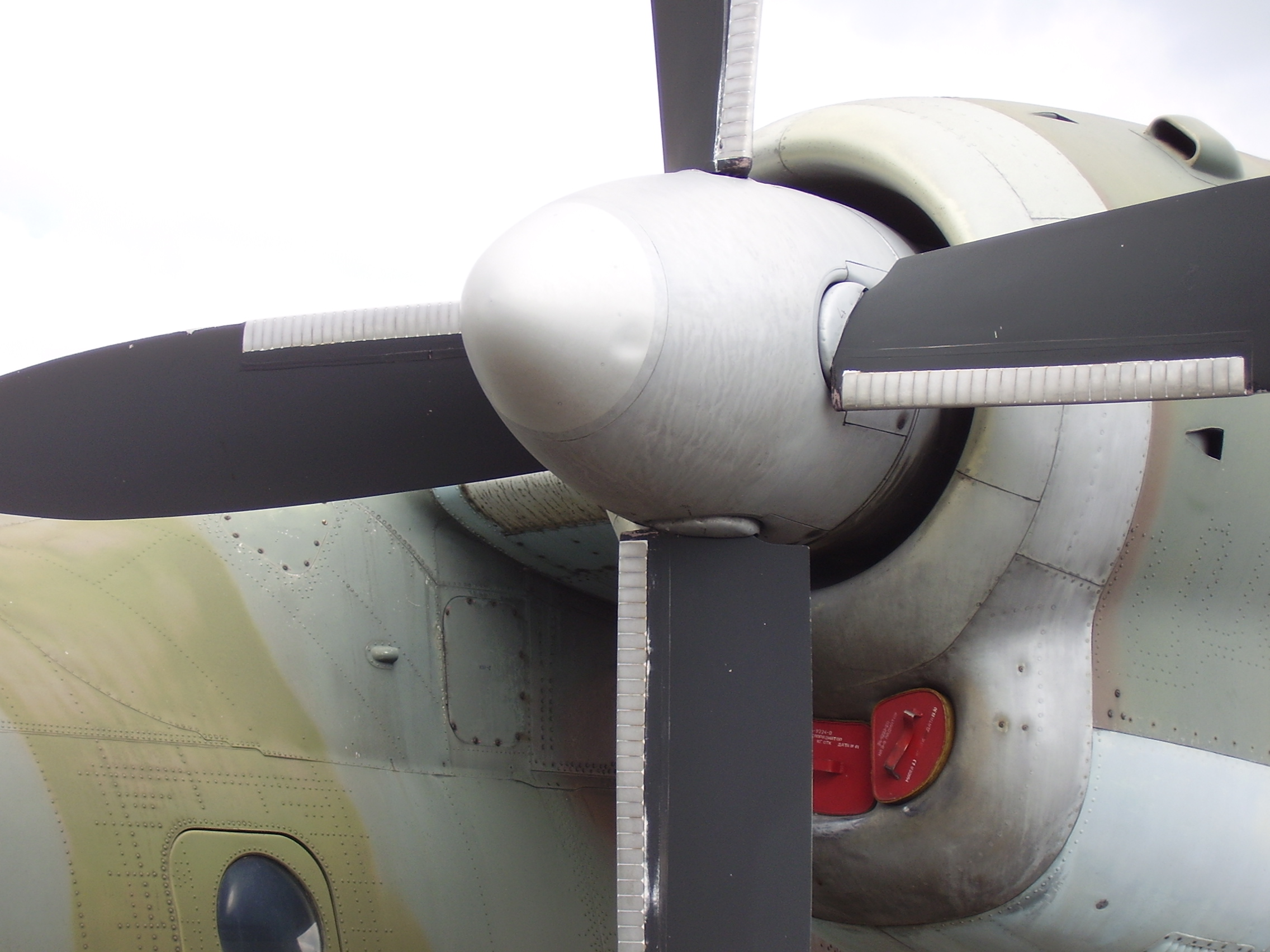 Luftwaffenmuseum der Bundeswehr; Airforce Museum of the Bundeswehr; Berlin-Gatow